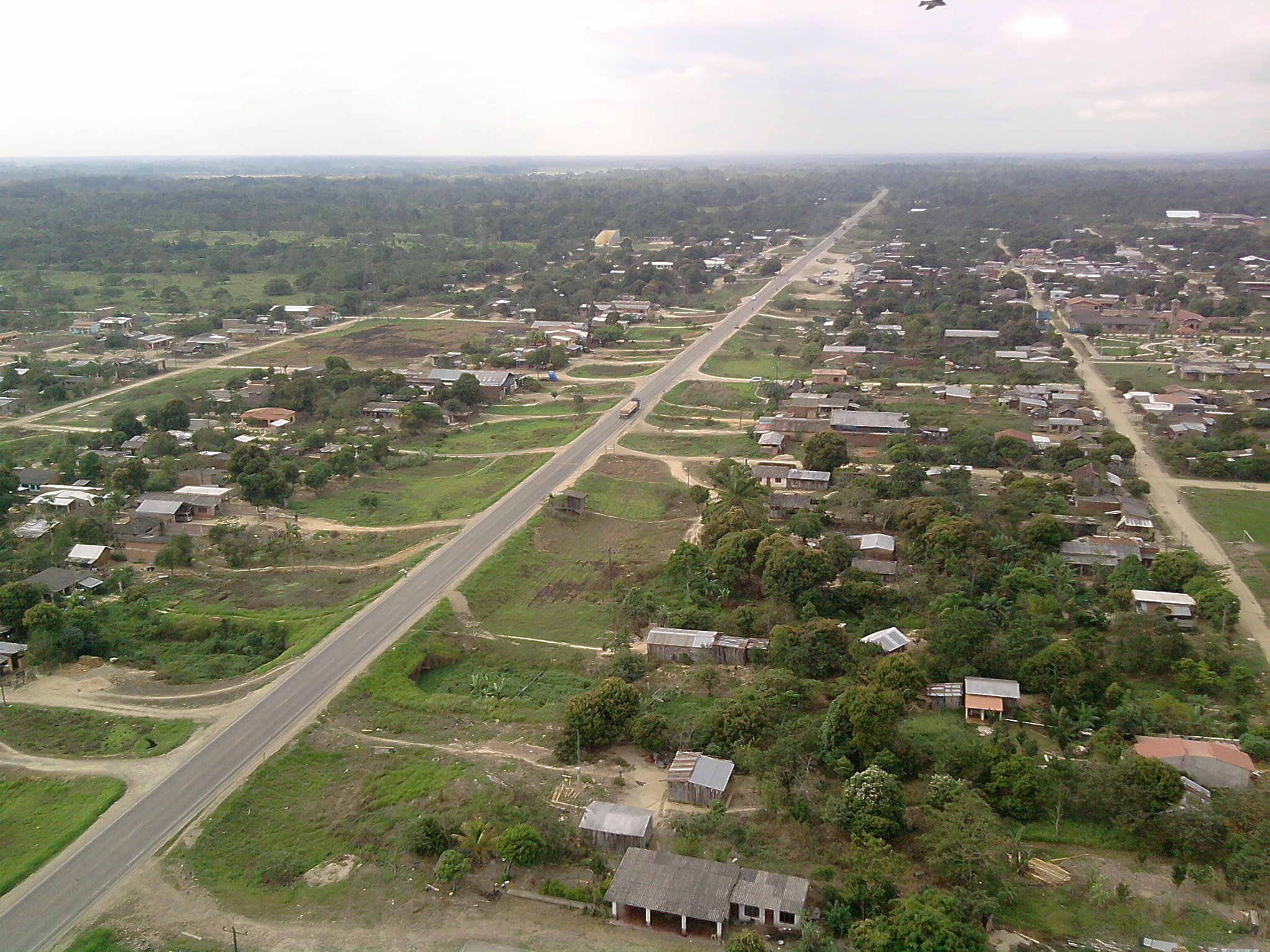 Bulo Bulo